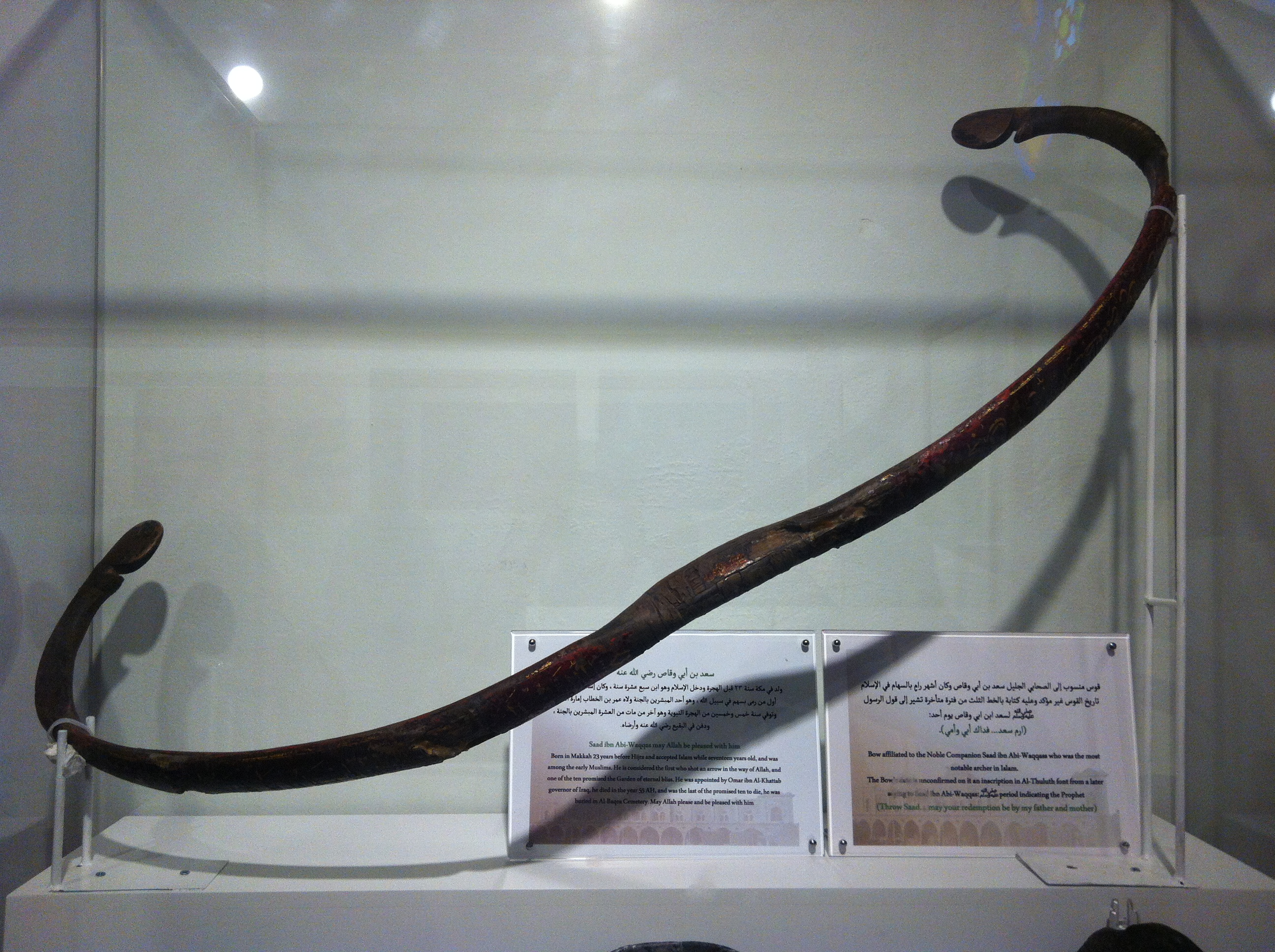 قوس منسوب إلى الصحابي سعد بن أبي وقاص موجود في متحف سكة حديد الحجاز بالمدينة المنورة. تاريخ القوس غير مؤكد، وقد نقش عليه كتابة بالخط الثُلُث من فترة متأخرة تشير إلى قول رسول الإسلام محمد لسعد بن أبي وقاص يوم أُحُد: ارم سعد ... فداك أبي وأمي